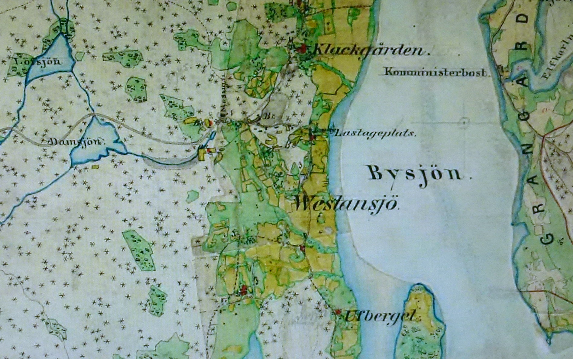 Västansjö och hyttområdet på häradskartan 1866